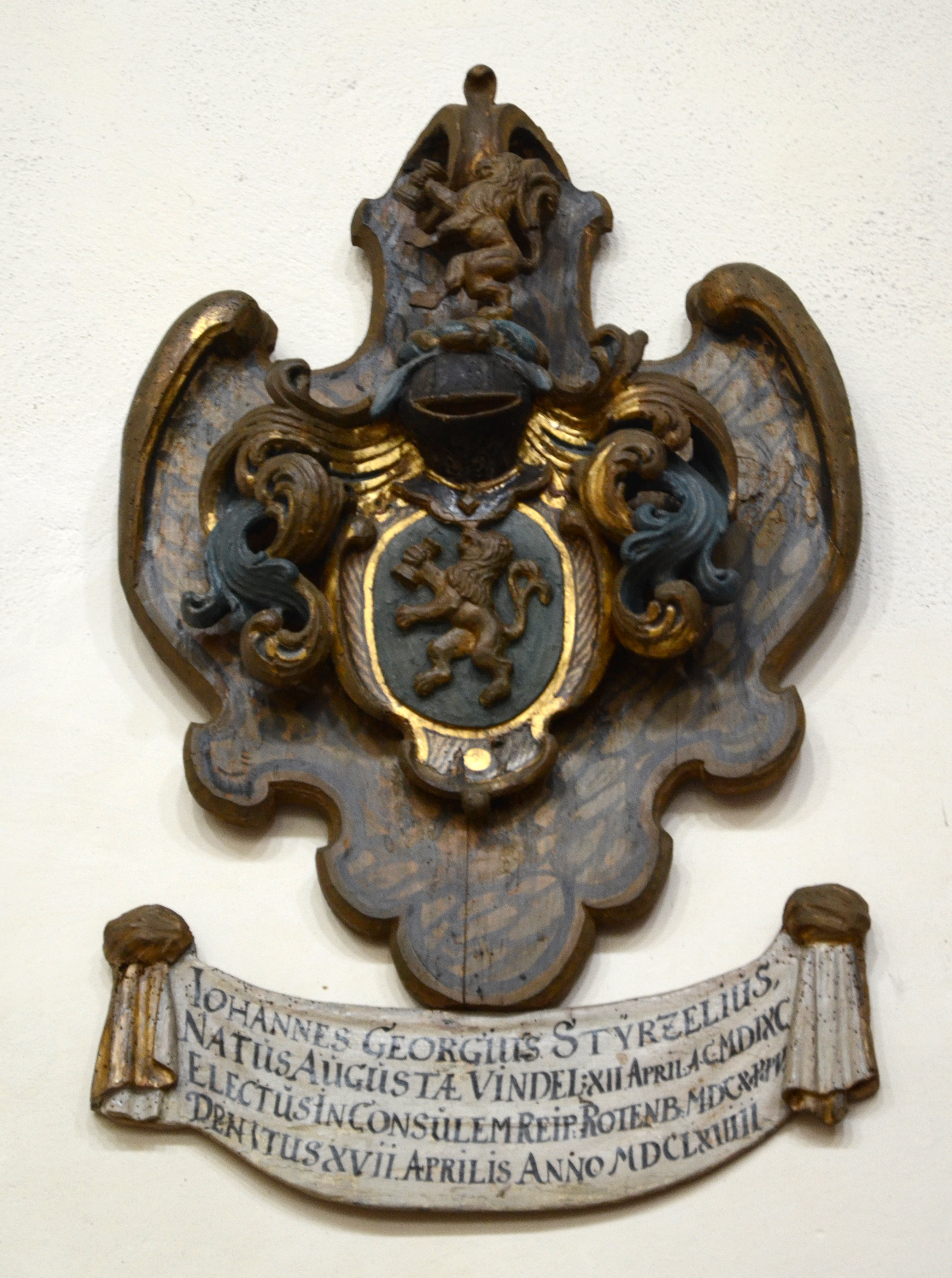 Wappentafel für Johann Georg Styrzel (1591-1668) in der Franziskanerkirche in Rothenburg ob der Tauber. Inschrift: Iohannes Georgius Styrzelius Natus Augusta Vindel. XII April AO MDIXC Electus in Consulem Reip. Rotenb. MDCXXXV Denitus XVII Aprilis Anno MDCLXVIII Übersetzung: Johannes Georgius Styrzelius am 12. April 1591 in Augsburg geboren 1635 zum regierenden Bürgermeister in Rothenburg gewählt am 17. April 1668 gestorben